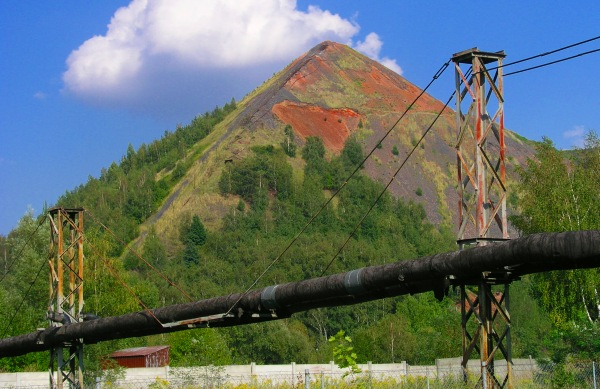 Hałda w Rydułtowach, najwyższa w Europie, drzewostan powstał w wyniku samo-zalesienia